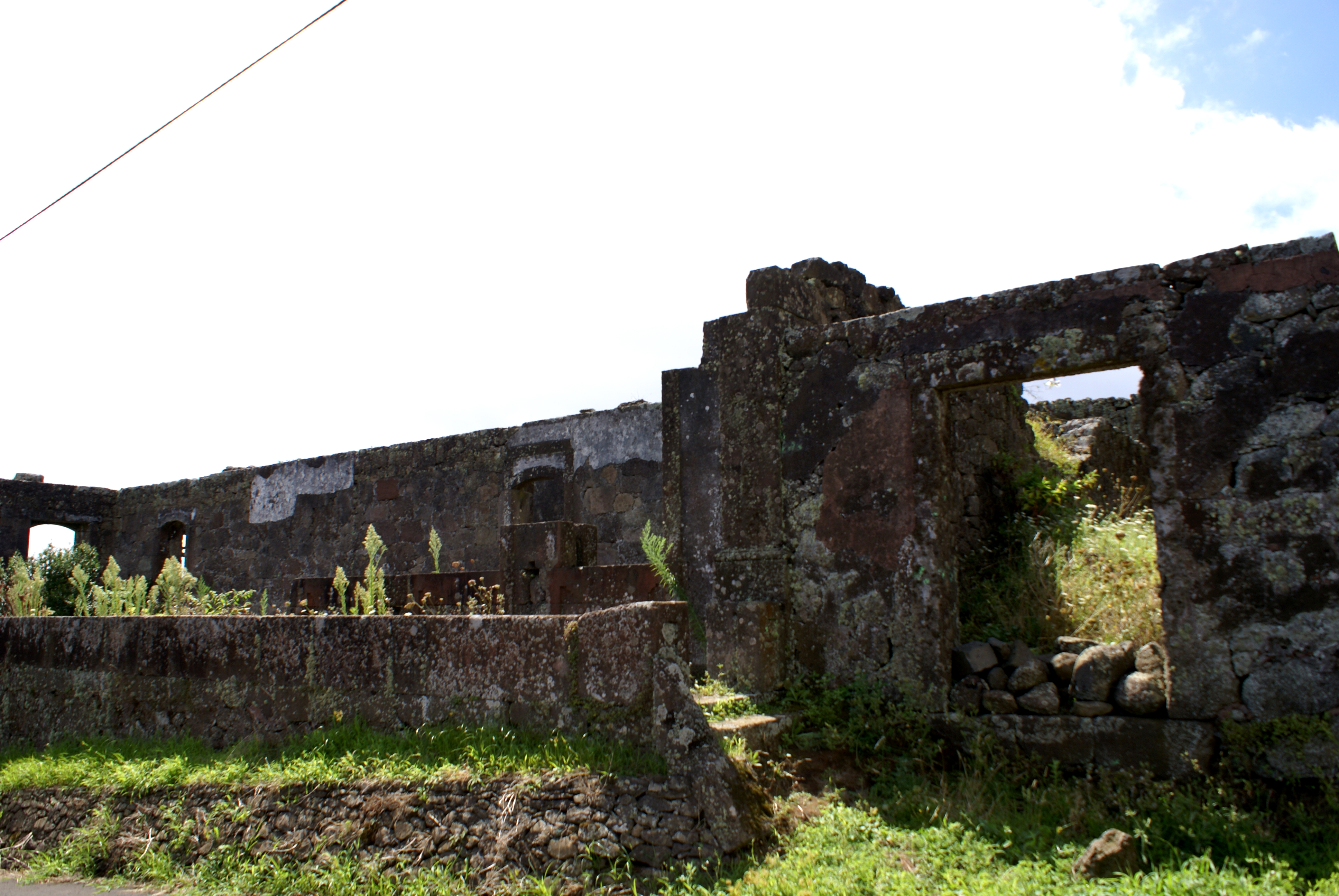 Solar dos Tiagos, ruínas, Topo, Calheta, ilha de São Jorge, Açores